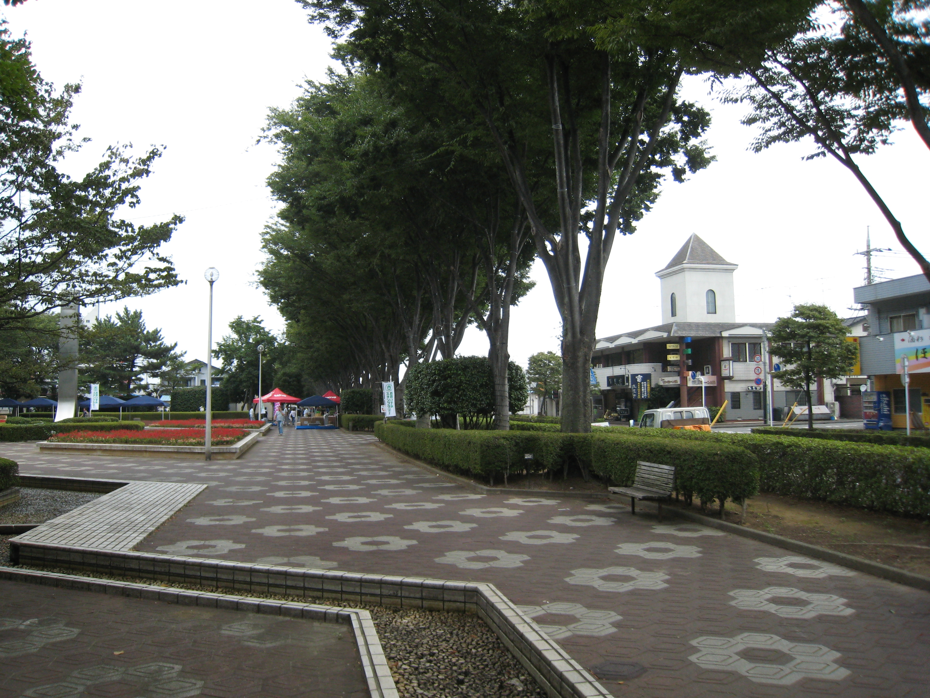 いずみ緑道。群馬県邑楽郡大泉町。 Izumi Green path in Oizumi-machi,Gunma prefecture,Japan